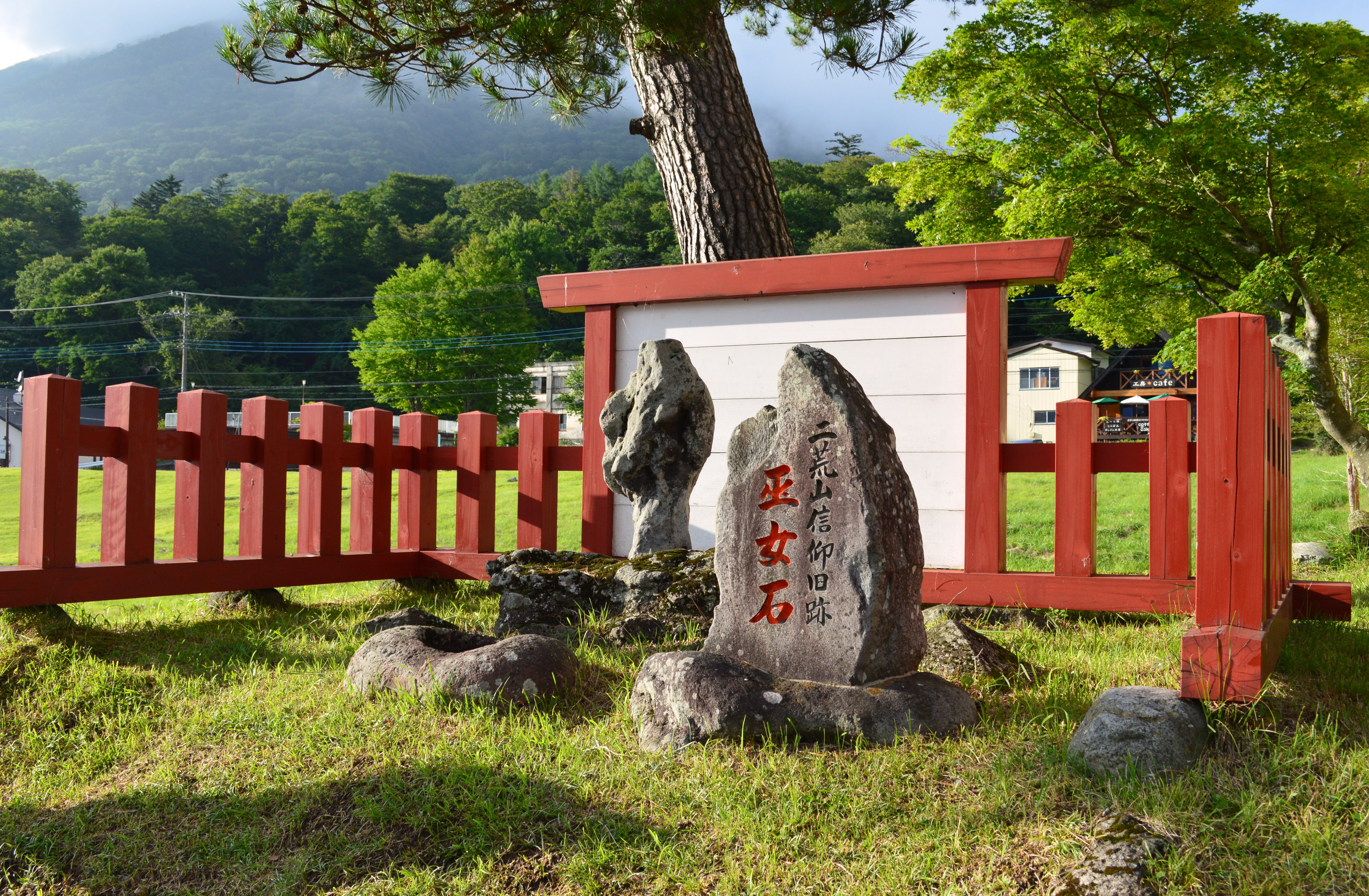 日光二荒山神社 中宮祠 巫女石